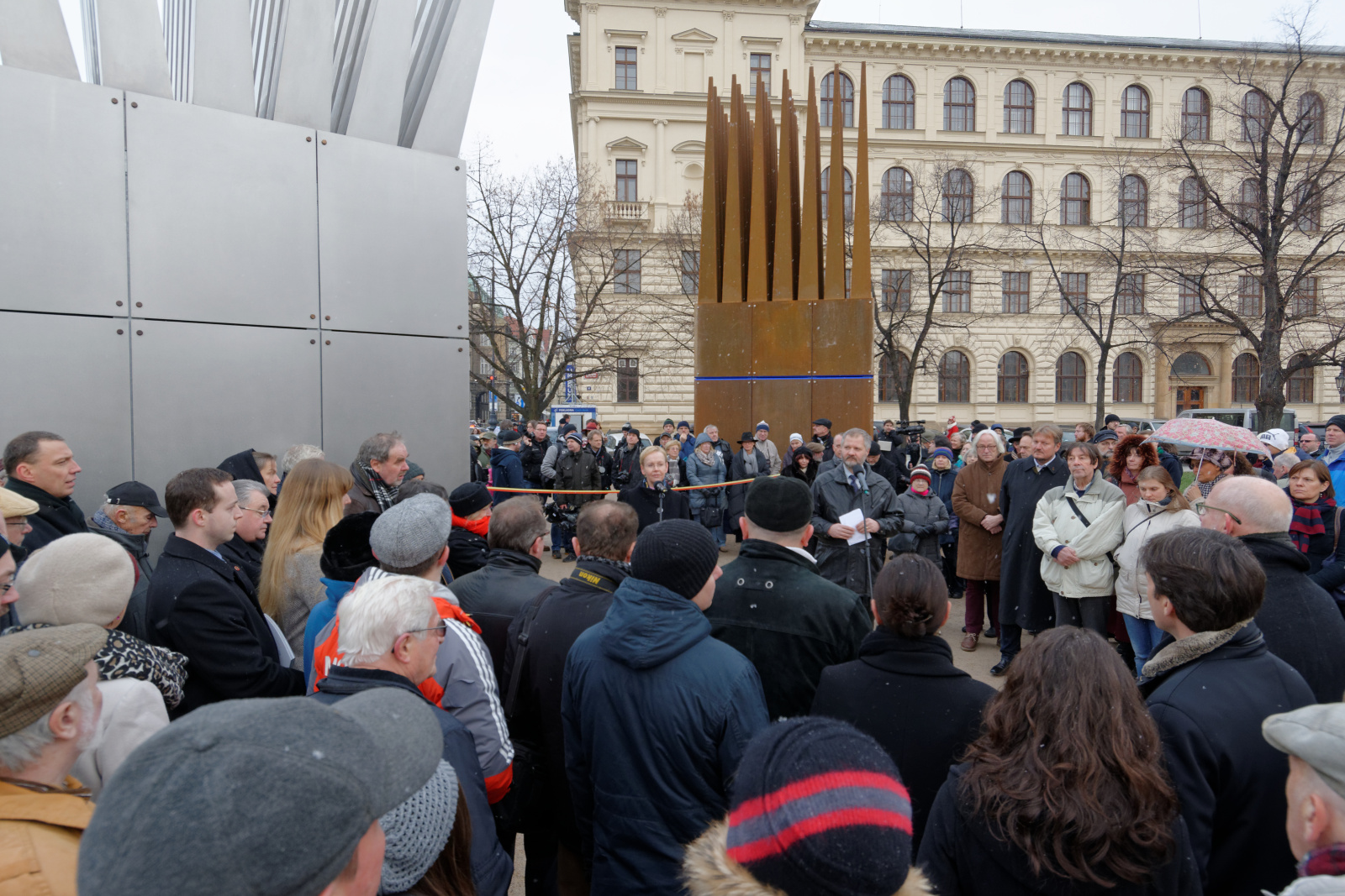 Slavnostní odhalení pomníku Jana Palacha na Alšově nábřeží v Praze, proslov Václava Hampla.